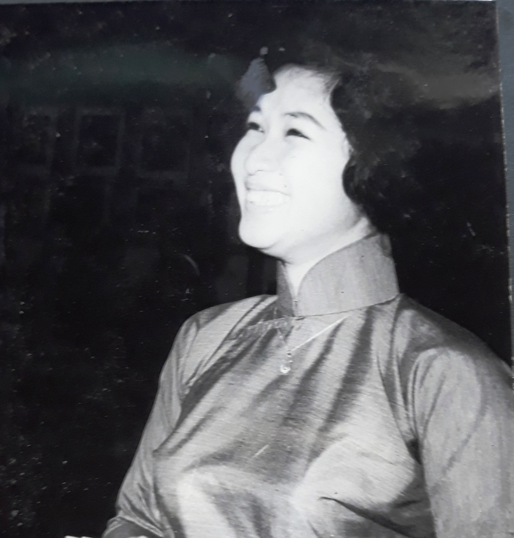 Áo dài